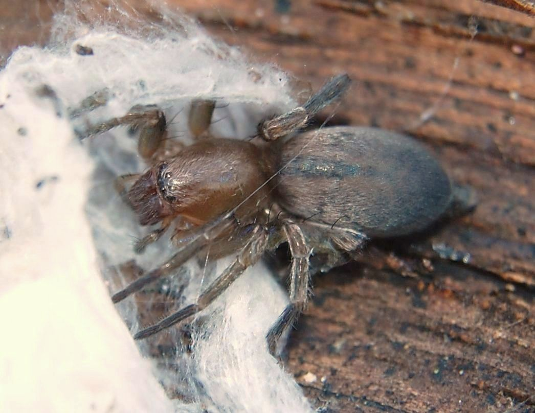 Clubiona corticalis, Weibchen; det. K.-H. Kielhorn, Berlin. Forst Jungfernheide, Berlin, Deutschland